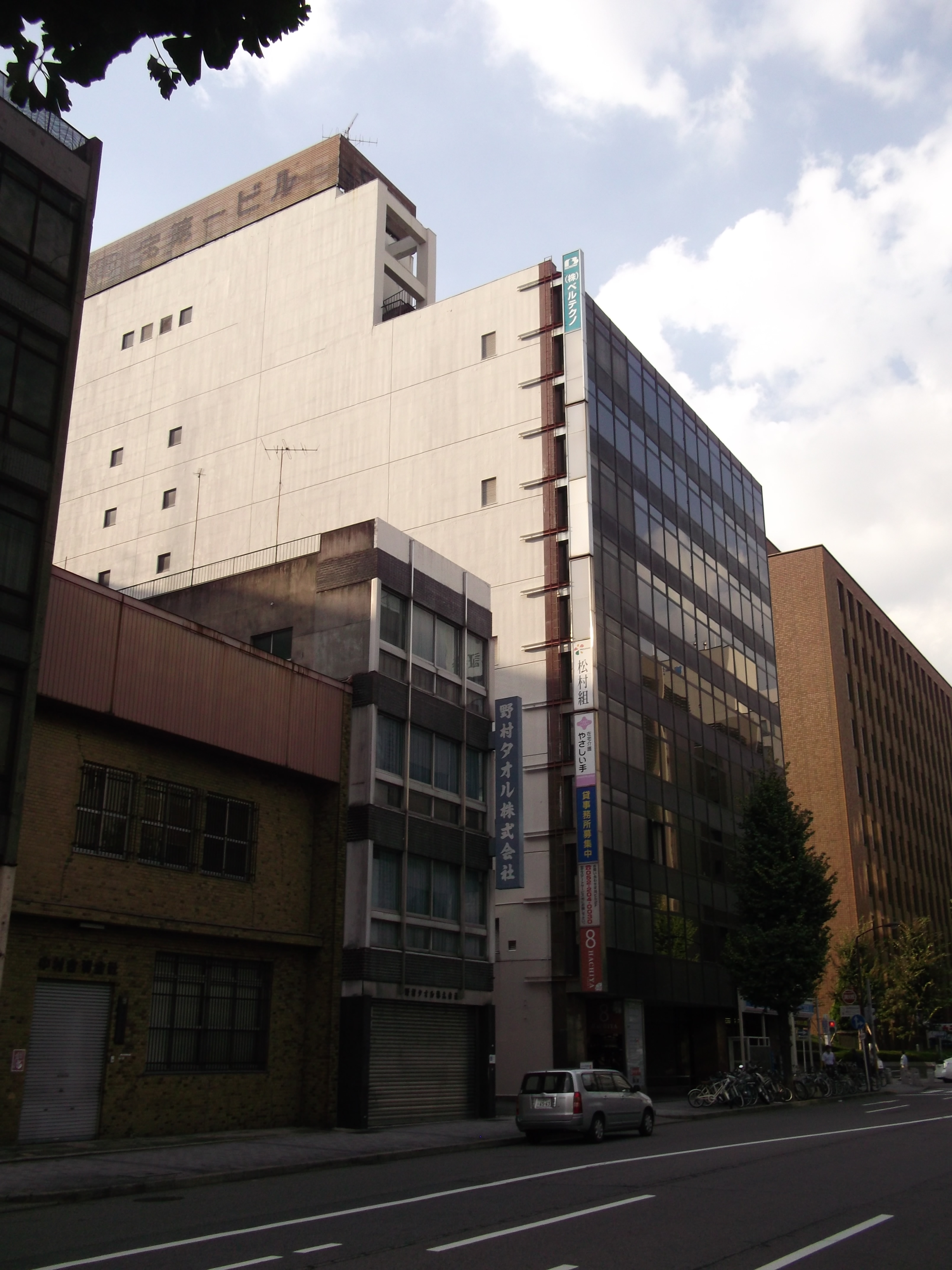 名古屋市中区の宝第一ビルを東側公道南側より撮影